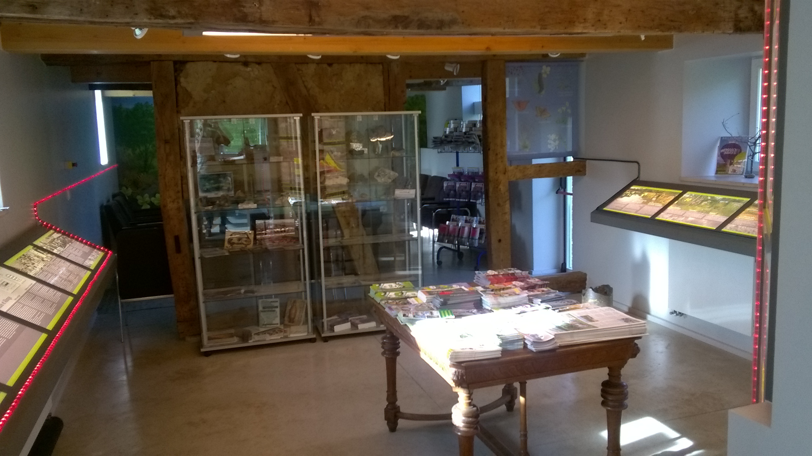 Begane grond van het Huis van de mijnzetel te Blieberg. Foto genomen vanaf de ingang richting het noordwesten. Helemaal links is zijn informatiepanelen over de mijngeschiedenis. Middenin staat een vitrine met voorwerpen uit de mijngeschiedenis tegen een vakwerkmuur. Daarachter is een lokaaltje te zien. Rechts tegen de muur zijn wederom informatiepanelen over de mijngeschiedenis. In het midden van de ruimte staat een tafel met informatiefolders.